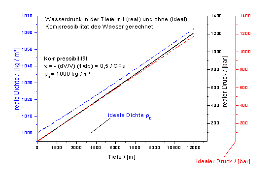 Wasserdruck in der Tiefe mit und ohne Kompressibilität des Wassers gerechnet